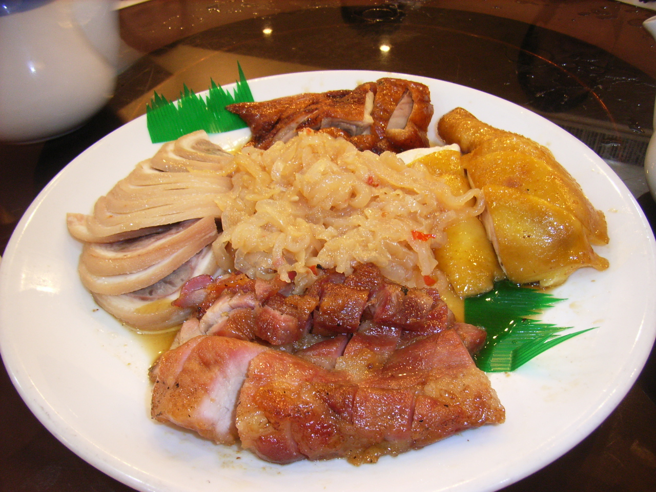 燒味拼盤: 是中國廣東粵菜、香港和澳門地區的酒樓常見小菜。